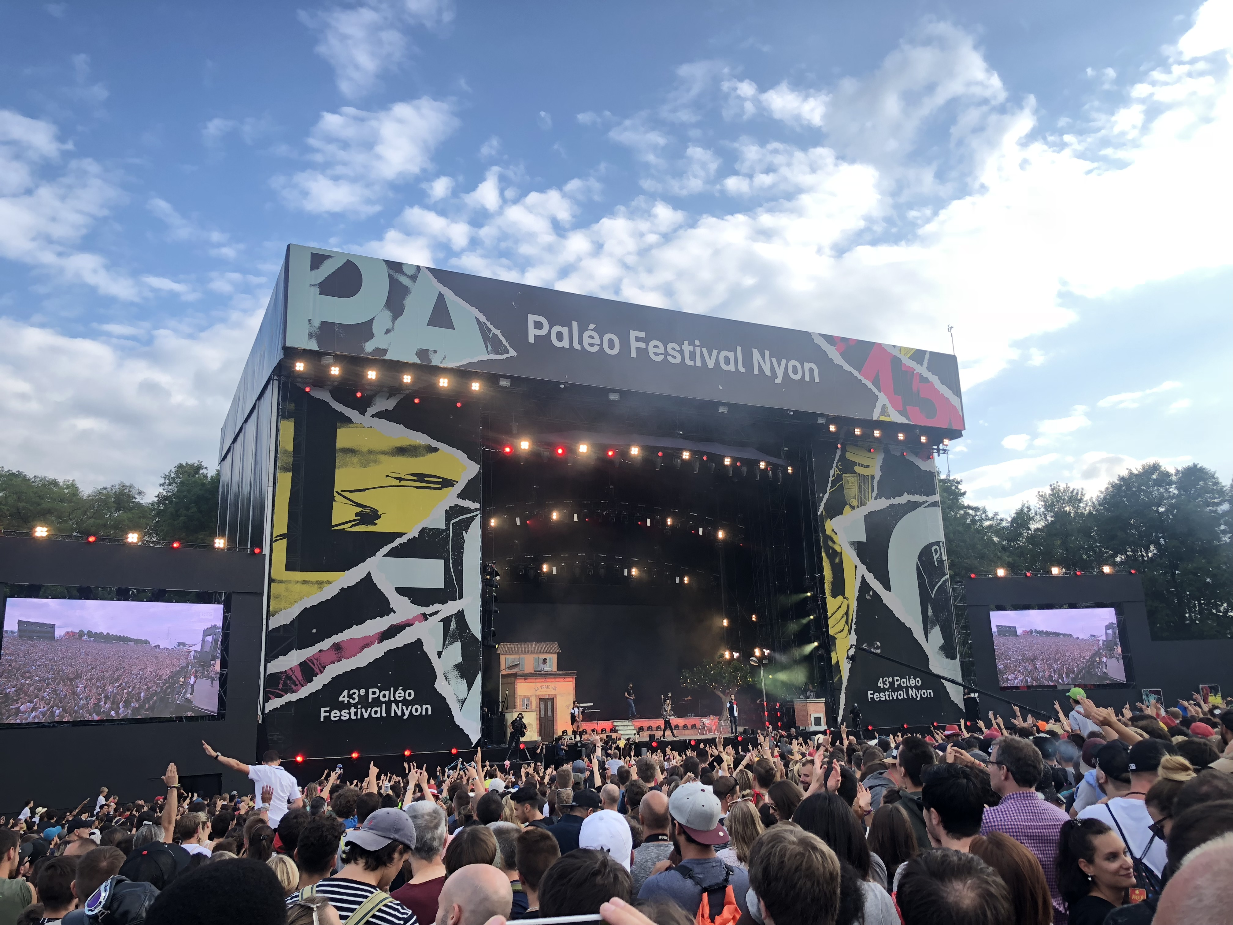 La Grande Scène de Paléo durant l'édition 2018